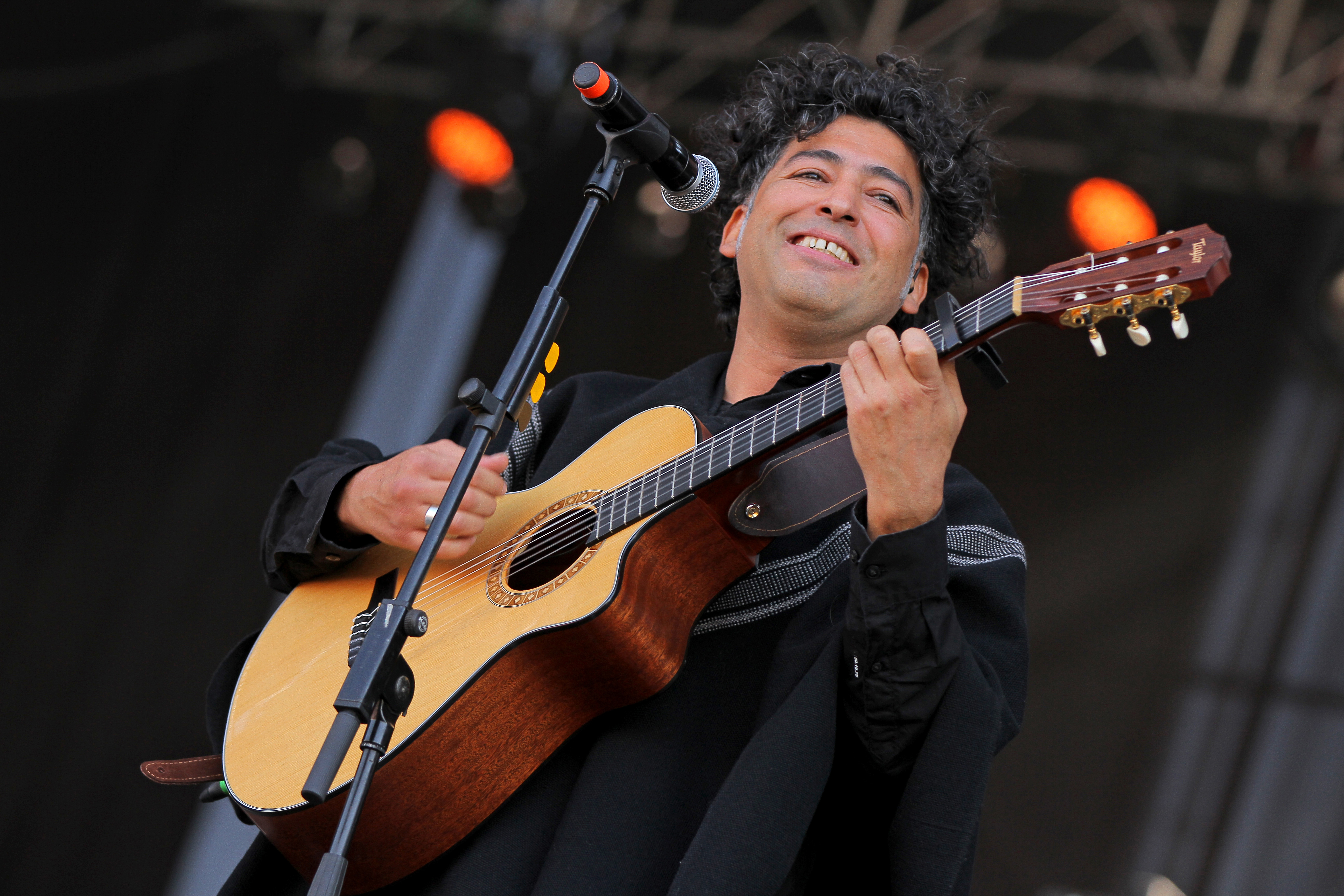 Manuel García (Arica, 1 de marzo de 1970) es un cantautor, poeta y guitarrista chileno, asociado a los sonidos de la Nueva Canción Chilena, pero que también ha incursionado en el rock.2 Fundador de la banda Mecánica Popular y voz del proyecto Víctor Jara sinfónico. Manuel fue llamado por la prensa especializada como El comandante del Folk Chileno3 y actualmente es uno de los músicos chilenos más premiados, aplaudidos y de mayor proyección. Si bien su carrera solista partió en 2005, es a partir de los últimos años en que su música ha cobrado mayor relevancia, luego de que haya surgido una nueva camada de cantautores chilenos jóvenes como Nano Stern, Camila Moreno, Francisca Valenzuela, Chinoy, Gepe, Pascuala Ilabaca, entre otros. Manuel García ha realizado conciertos en el extranjero en diversas ocasiones, especialmente en España y México. Foto de Carlos Müller